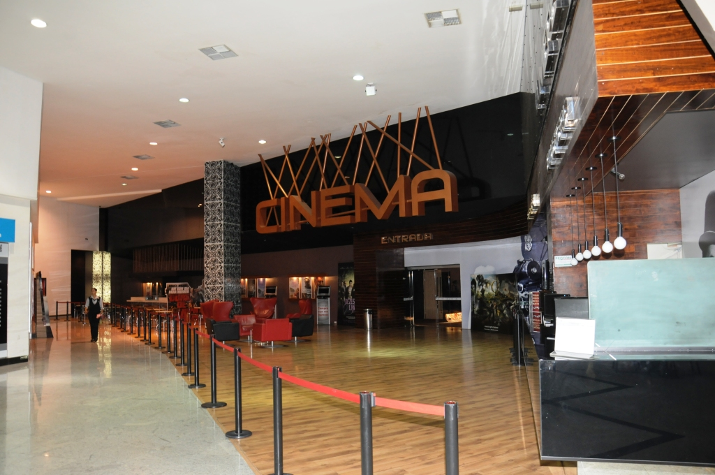 Entrada e bilheteria do Lumière Cinemas do Shopping Bougainville de Goiânia